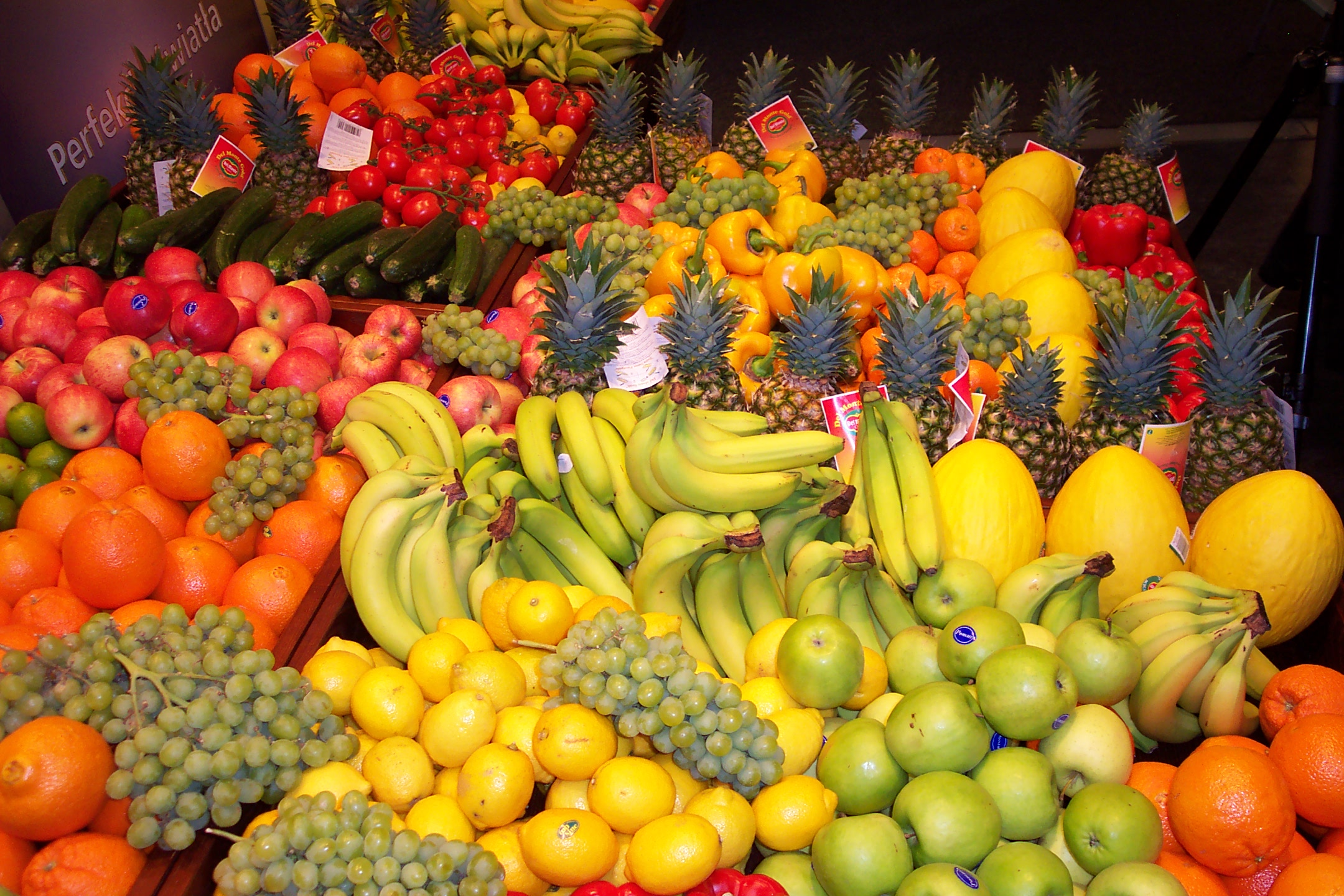 Ladung der Kühlschifffahrt